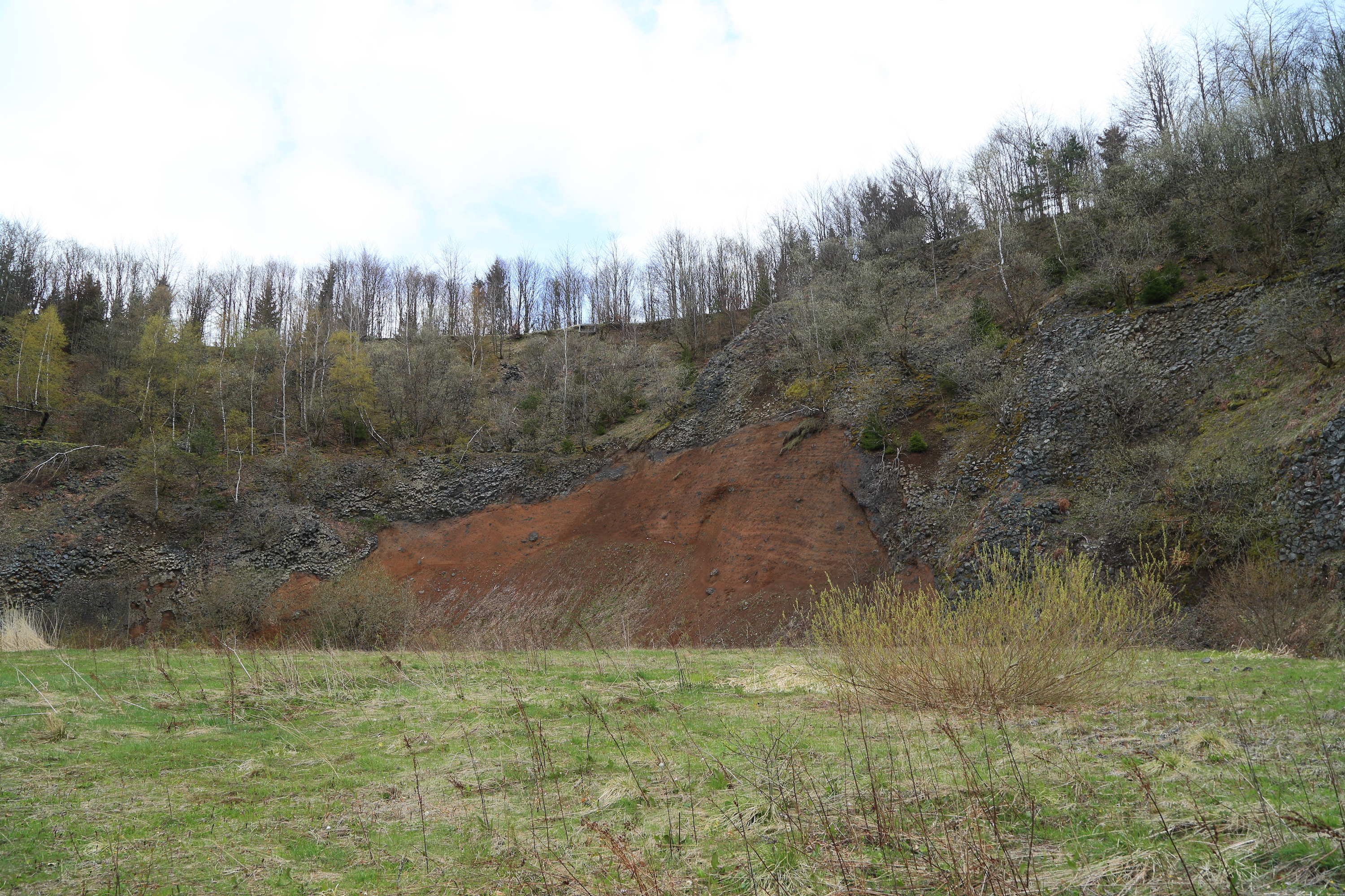 Vulkankrater am Gebirgsstein ESE von Oberbach Bayerns schönste Geotope Nr.: 84; Geotop-Nummer: 672A017